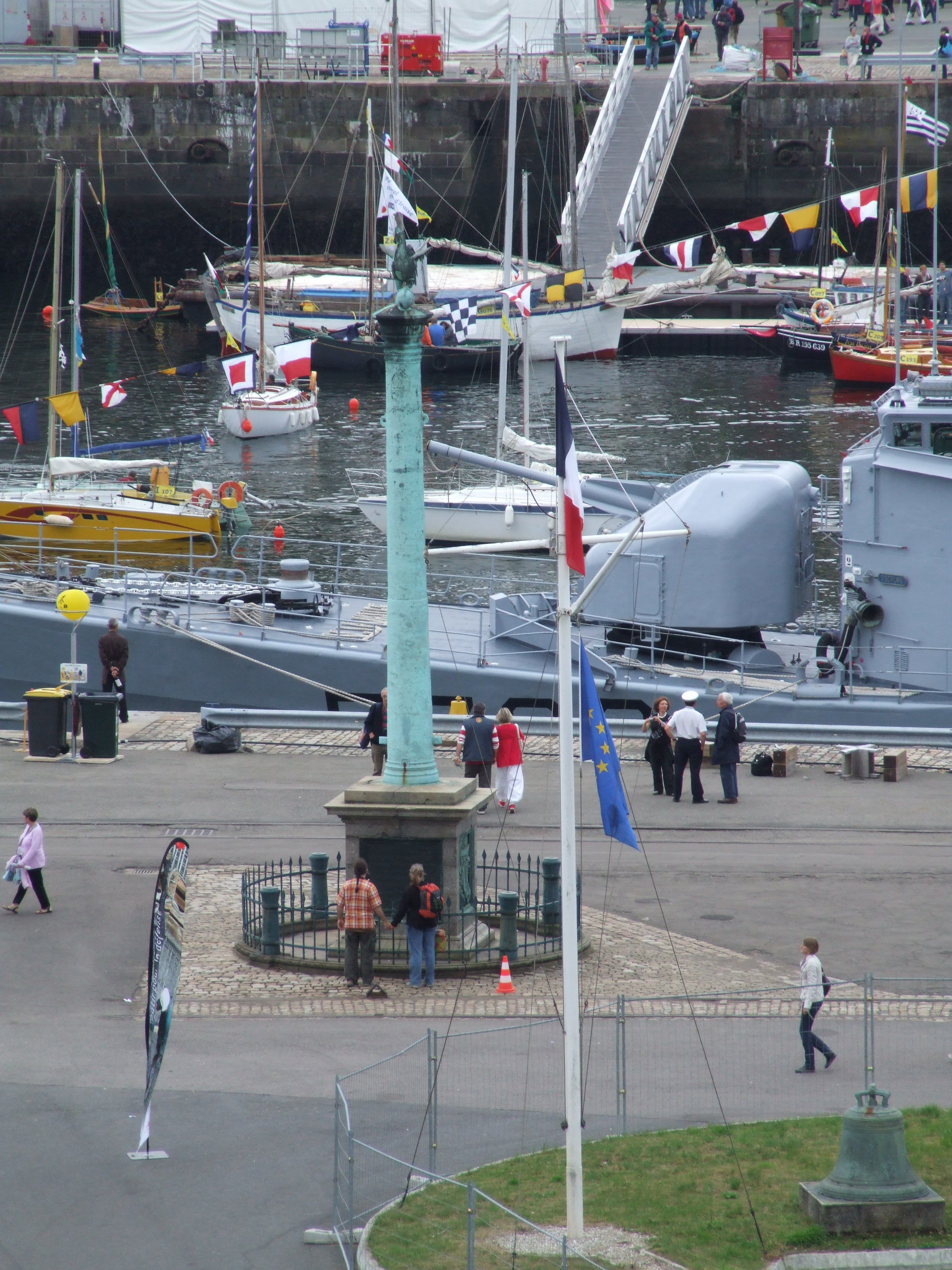 Photo du monument La Consulaire, à Brest - prise lors de la fête maritime de Brest 2008